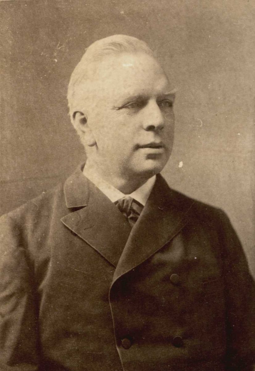 Georg Andreas Bull. Fra Byhistorisk samling hos Oslo Museum.